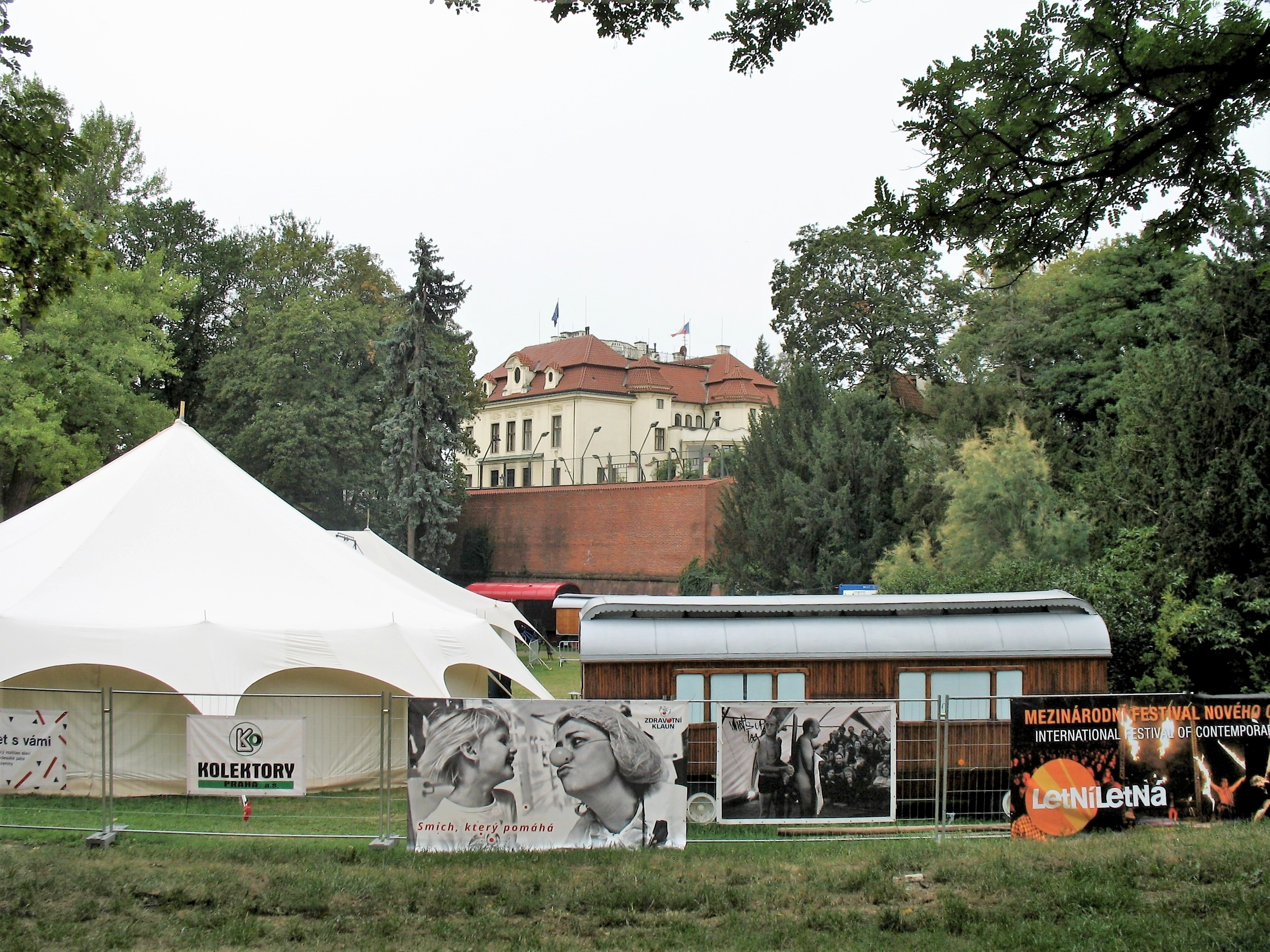 Festival nového cirkusu Letní Letná, Praha, Letenské sady, srpen 2018. V pozadí Kramářova vila